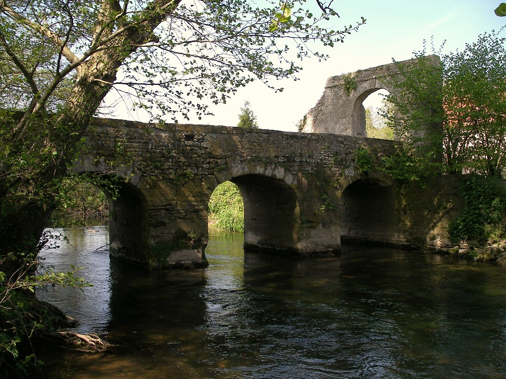 Pont du Bigard 1818 enjambant la Seulles au Manoir (Calvados)